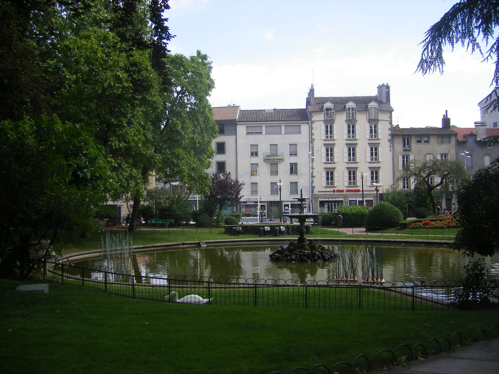 Aurillac